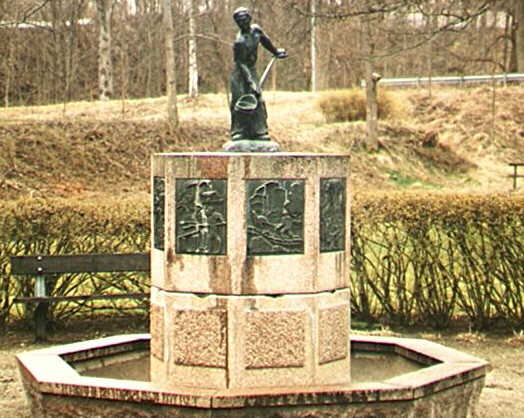 Minnesmonument Ankarsrums Bruk 300 år